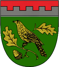 Der rot-silberne Zinnenschnitt im Wappen der Gemeinde Reitzenhain stellt den historischen Bezug zur hessischen Landesherrschaft her, besonders zur Linie Rheinfels-Rotenburg, die von 1648 bis 1794 bestand. Das Grün des Wappengrundes symbolisiert als Farbe des Waldes die Ortsnamenssilbe Hain, während die Darstellung des Vogels in der volkstümlichen Bezeichnung Reitzenhainer Kuckuck begründet ist.[1] Das Wappen wurde am 8. April 1991 genehmigt.